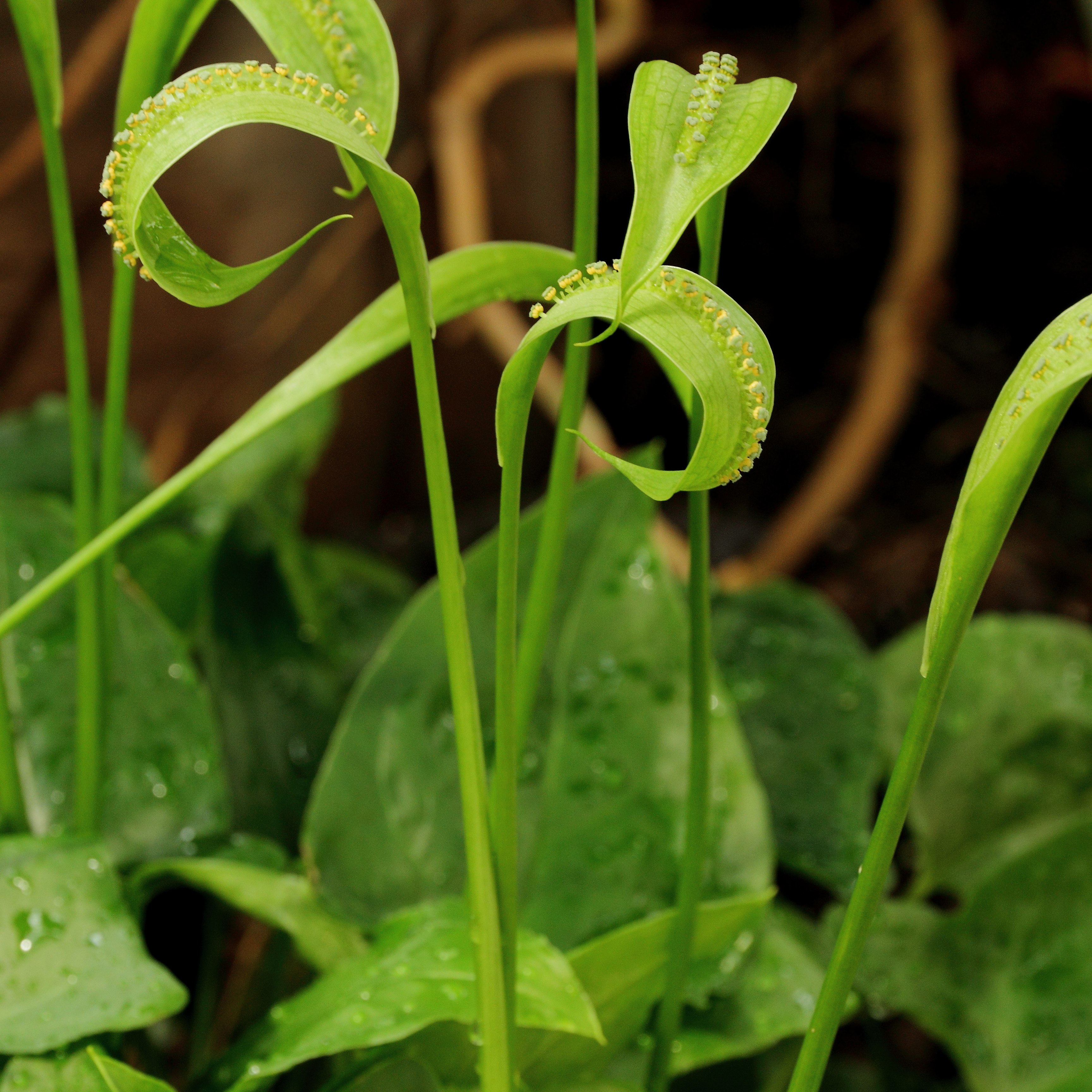 Spathicarpa hastifolia i Bergianska trädgården.